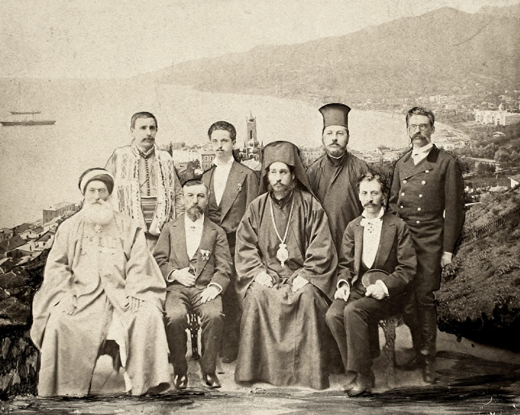 Делегацията от депутати от I ВНС, която на 4 май 1879 г. връчва на Ал. Батенберг в Ливадия/Ялта (Крим) решението за избора му за княз. Седнали отляво надясно: главният мюфтия хаджи Мюедзин, Тодор Бурмов, Варненският митрополит Симеон и д-р Васил Караконовски. Прави отляво надясно: Младен Цеков, Константин Стоилов, неизвестен депутат и Драган Цанков. Експонат на Националния исторически музей, София